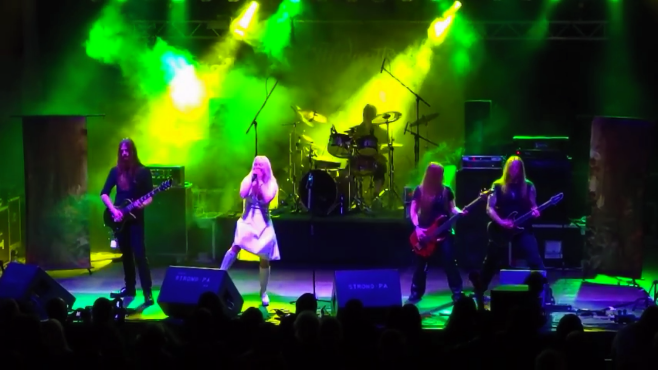 Midnattsol en vivo en el Rägnarok Festival, 2013